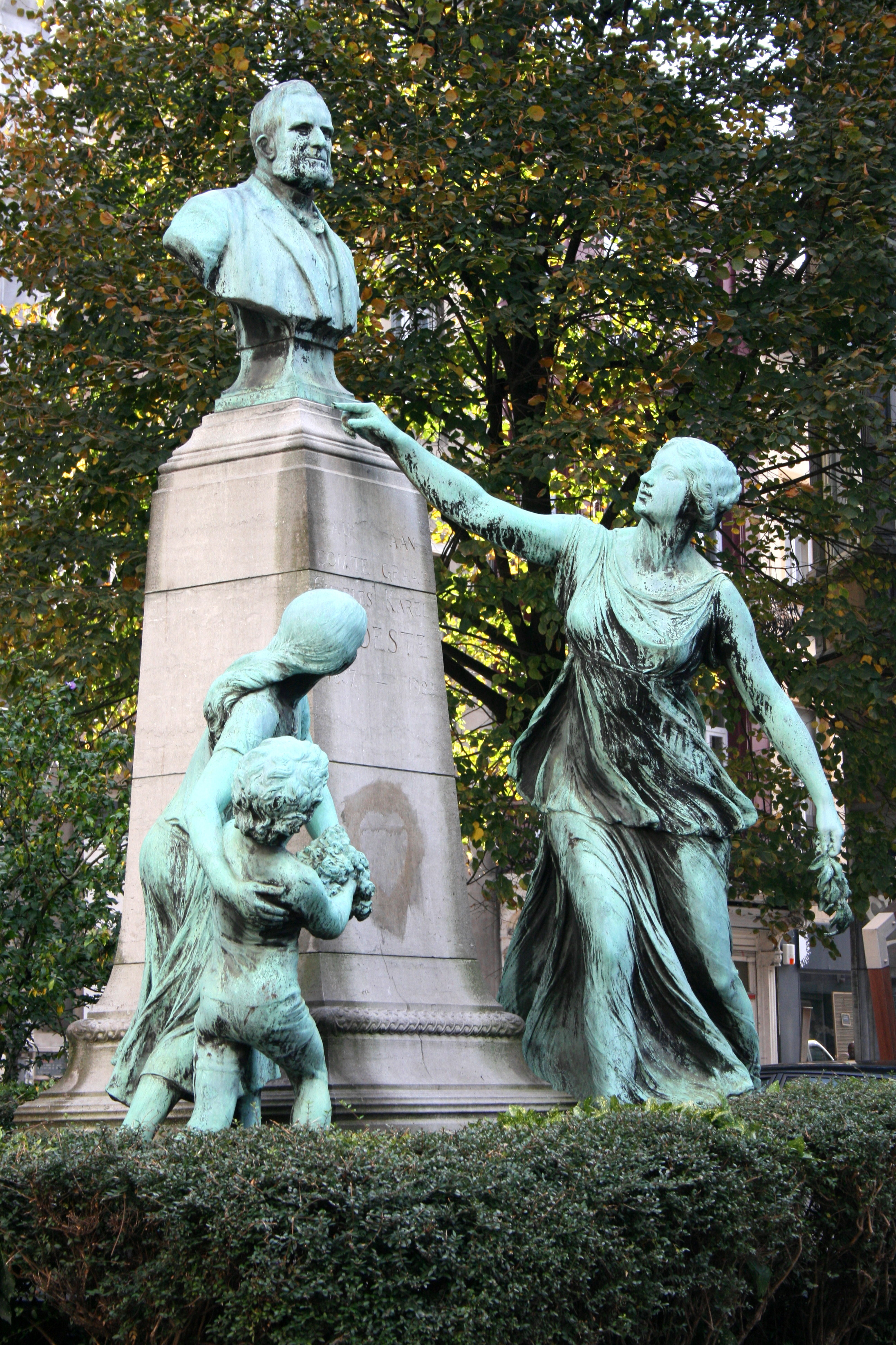 Monument à Charles Woeste, place Saint-Boniface, Ixelles. Oeuvre du sculpteur Frans Huygelen